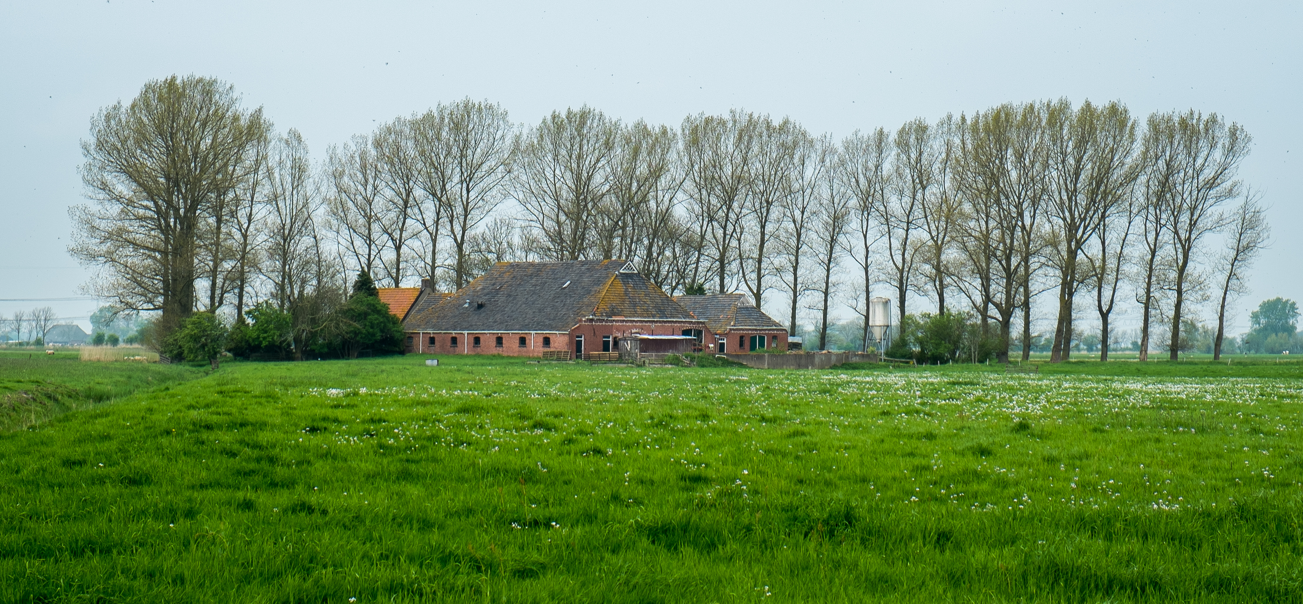 Boerderij Zijlvesterweg 2